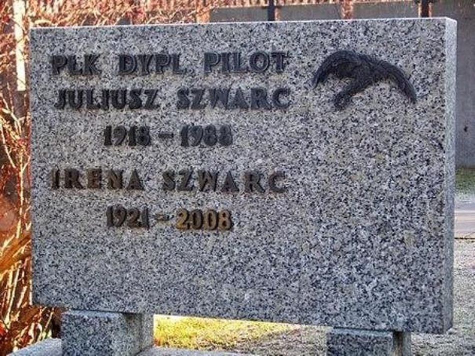 Komendant OSL-5 - płk dypl. pil. Juliusz Szwarc